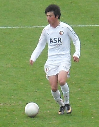 Foto: Rob van der Heijden Foto van de voor Feyenoord spelende Ryo Miyaichi. Dit is een Japanse aanvaller die door Feyenoord gehuurd is van het Engelse Arsenal.